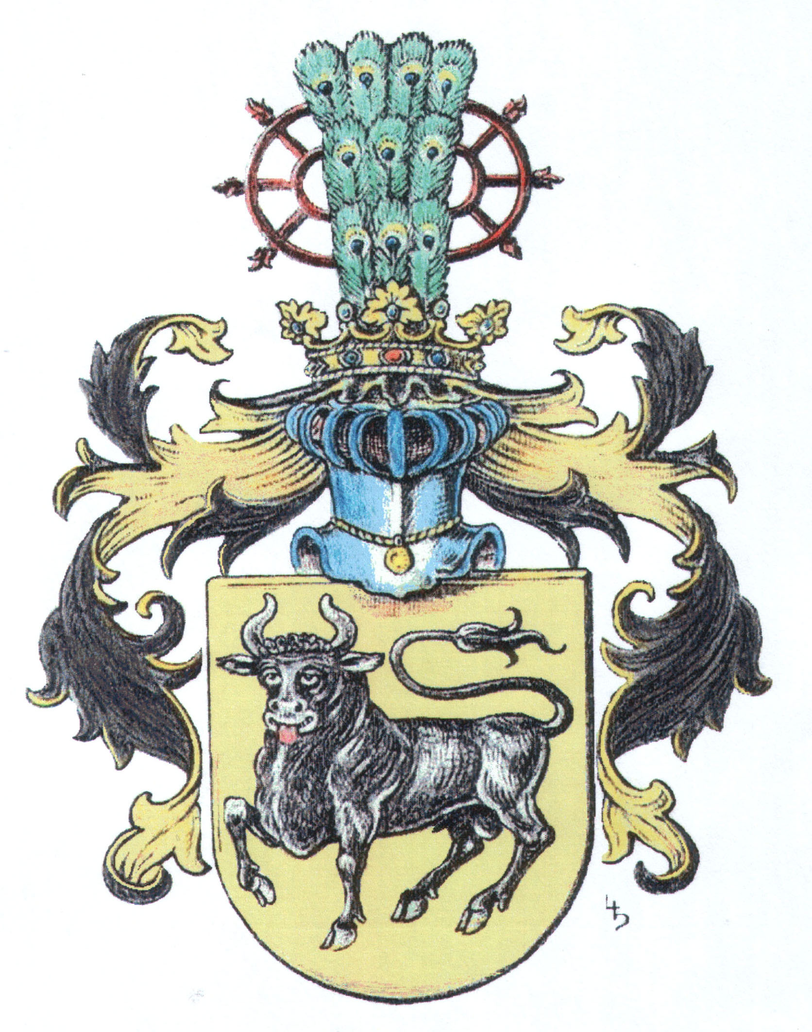 Plessenwappen im ca. 18. Jahrhundert Datum: ca. 18. Jahrhundert Urheber: unbekannter Heraldiker Quelle: Familienarchiv meiner Plessenmutter